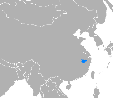 Idioma hui